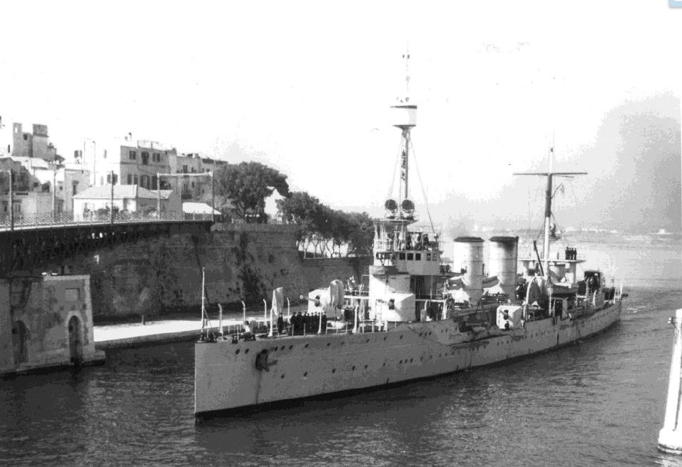 L’incrociatore leggero Bari in transito nel canale Navigabile di Taranto.